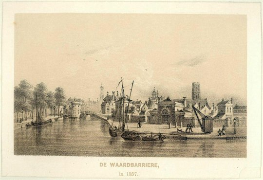 De nieuwe Utrechtse stadskraan bij de Weerdbarrière in de stad Utrecht, gebouwd nadat de oude aan de Ganzenmarkt in 1837 was bezweken. In 1968 werd deze nieuwe kraan gesloopt.